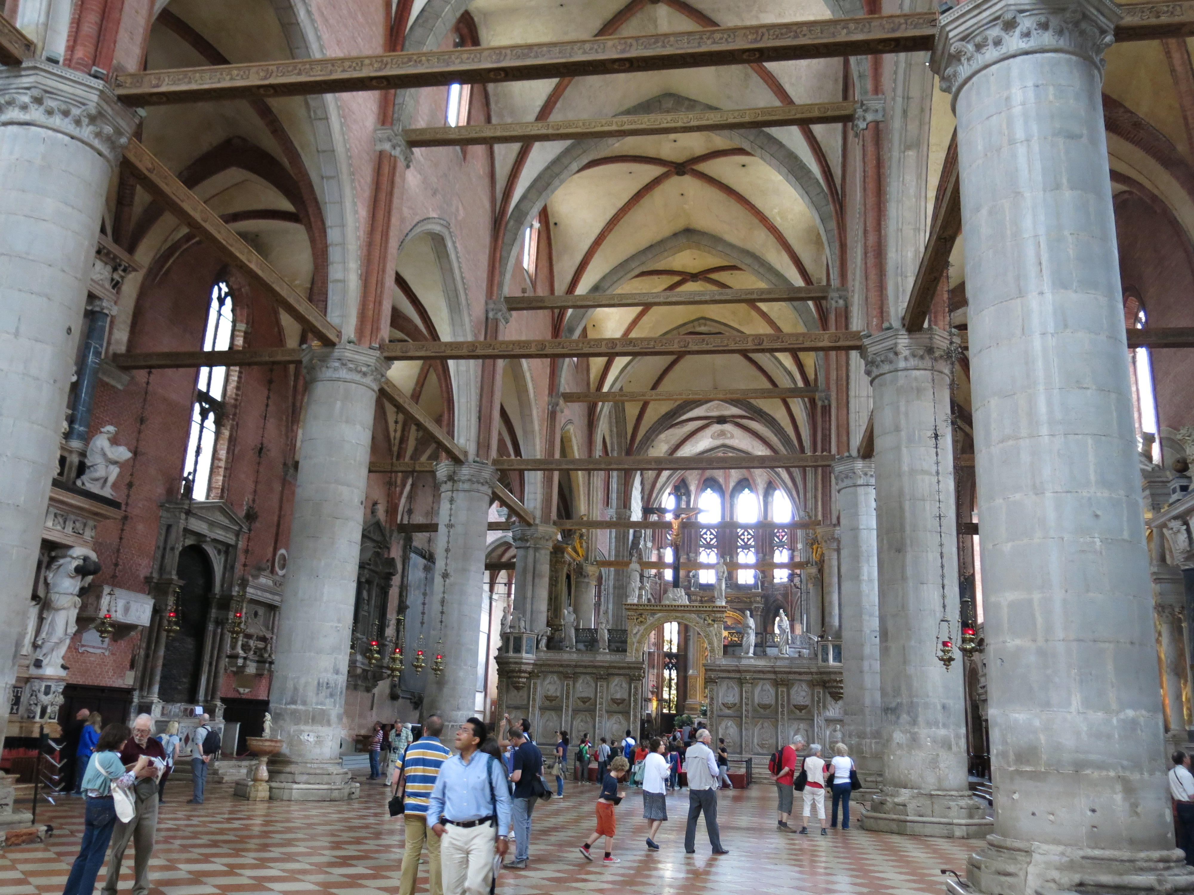 Venezia 2013